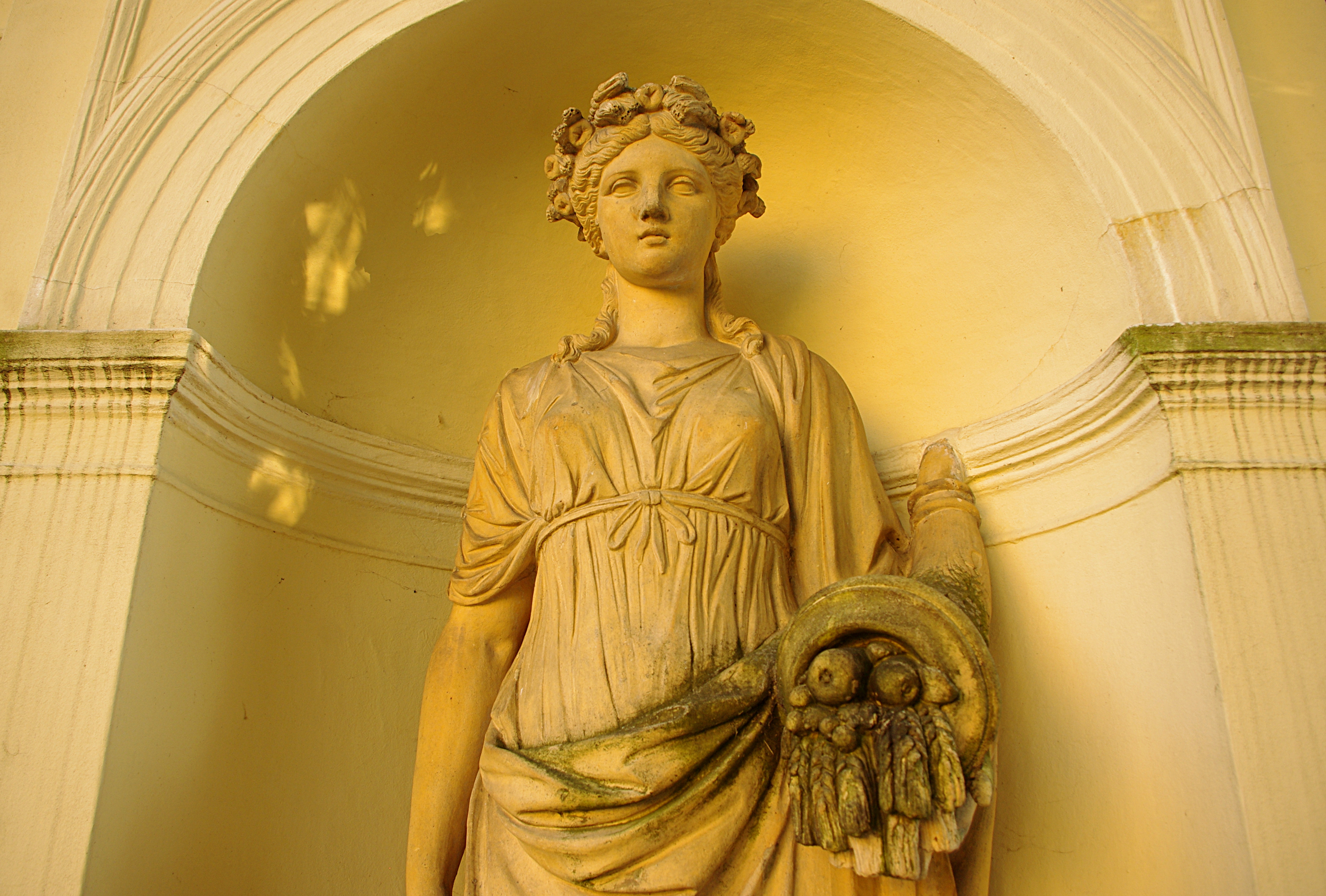 Ostromecko, tarasy przy pałacu Nowym, XIX (w zespole pałacowym)